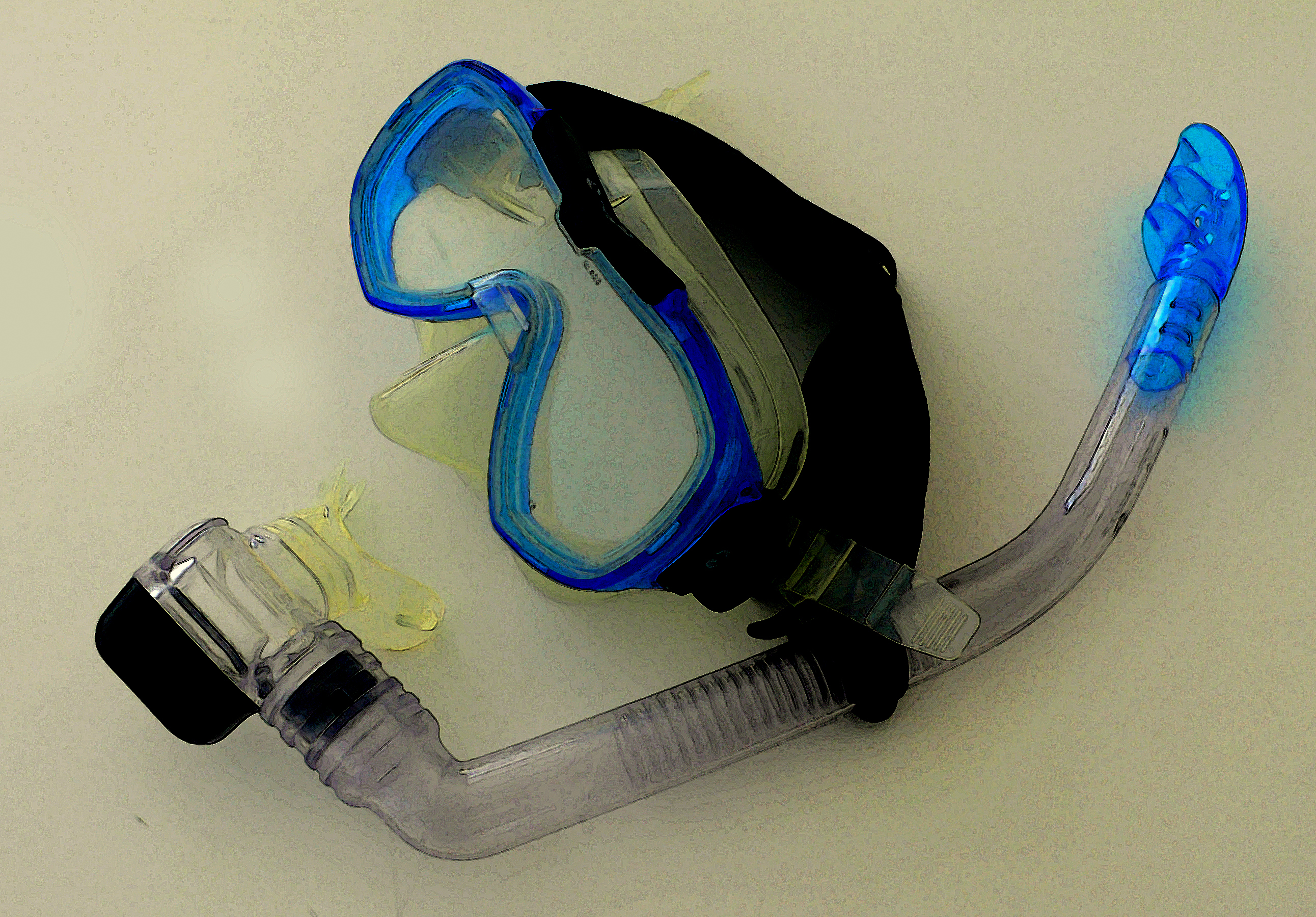 Diving Mask, 13-09-07